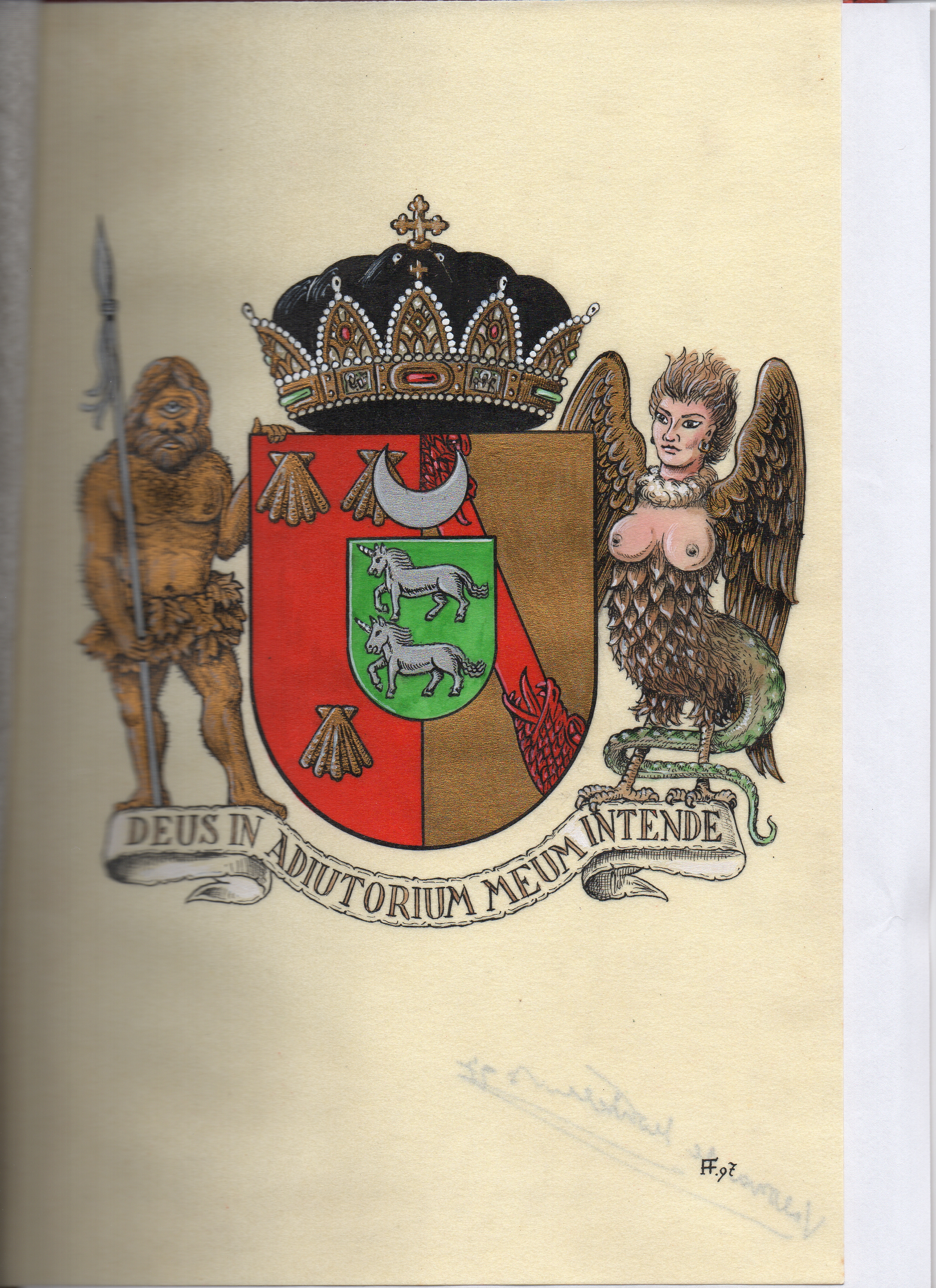 Coat of Arms of Duke of Archipelago